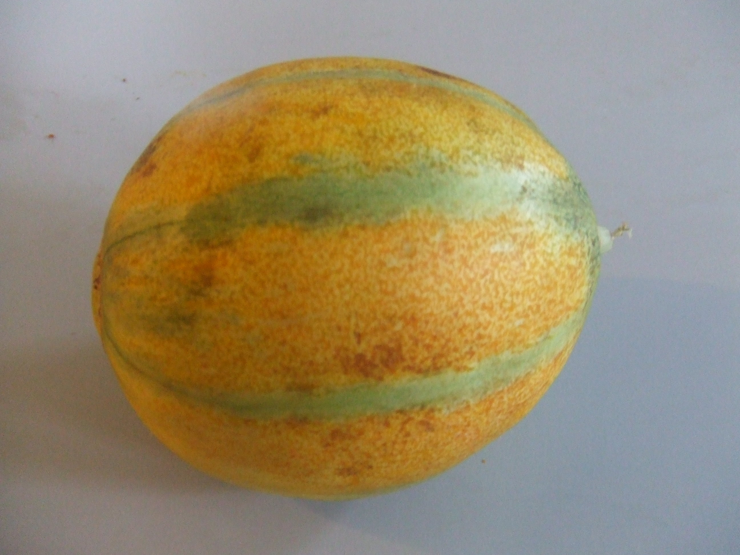 Ogenmeloen gekocht op de Binnenrotte markt in Rotterdam